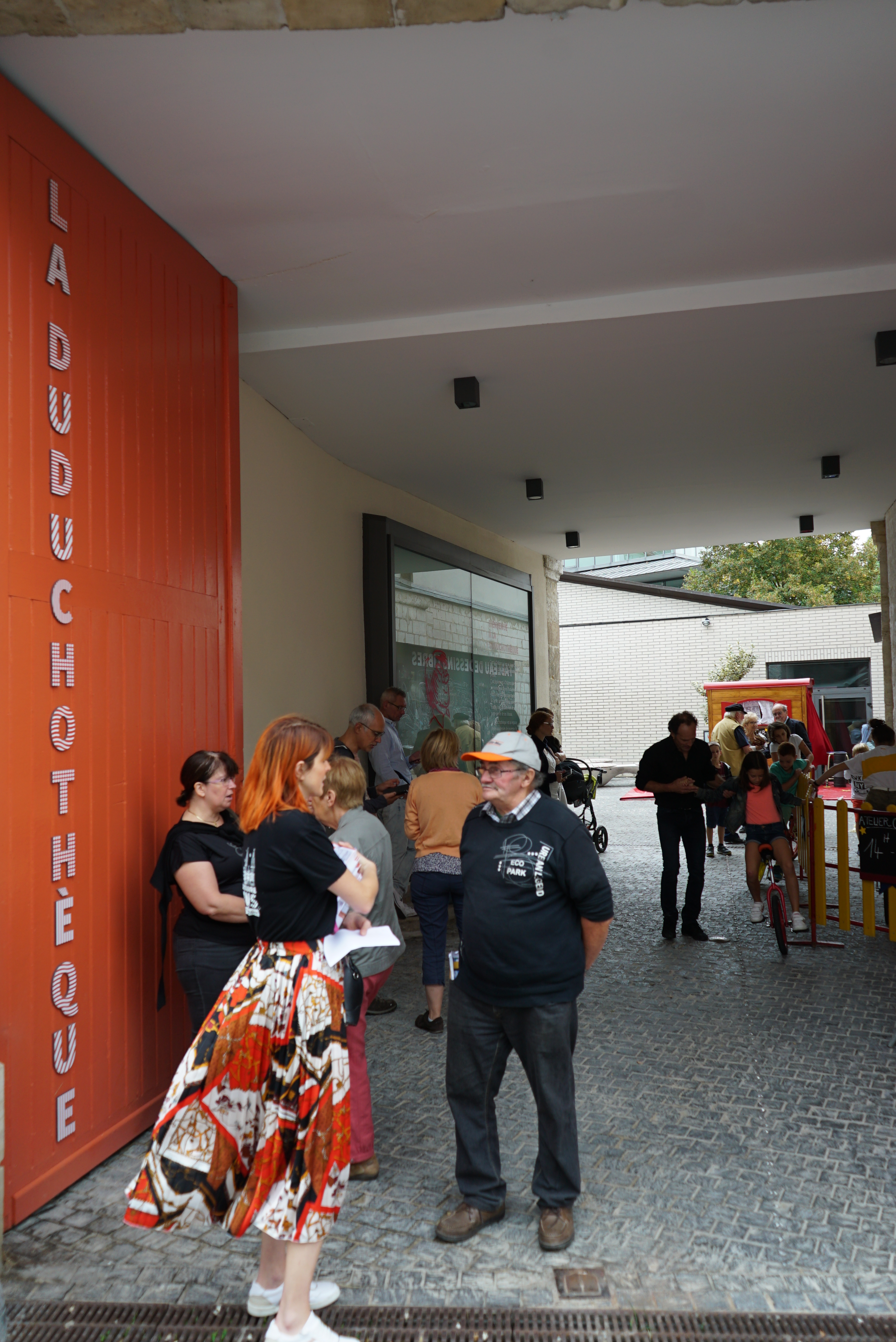 lorsdes Journées européennes du patrimoine de 2019 à Châlons.